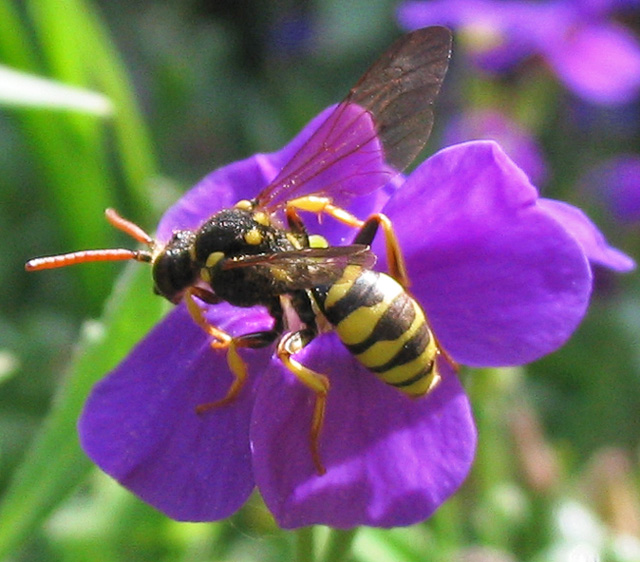 Beschreibung: Wespenbiene (Nomada succincta) Fotograf: Darkone, 27. Mai 2005